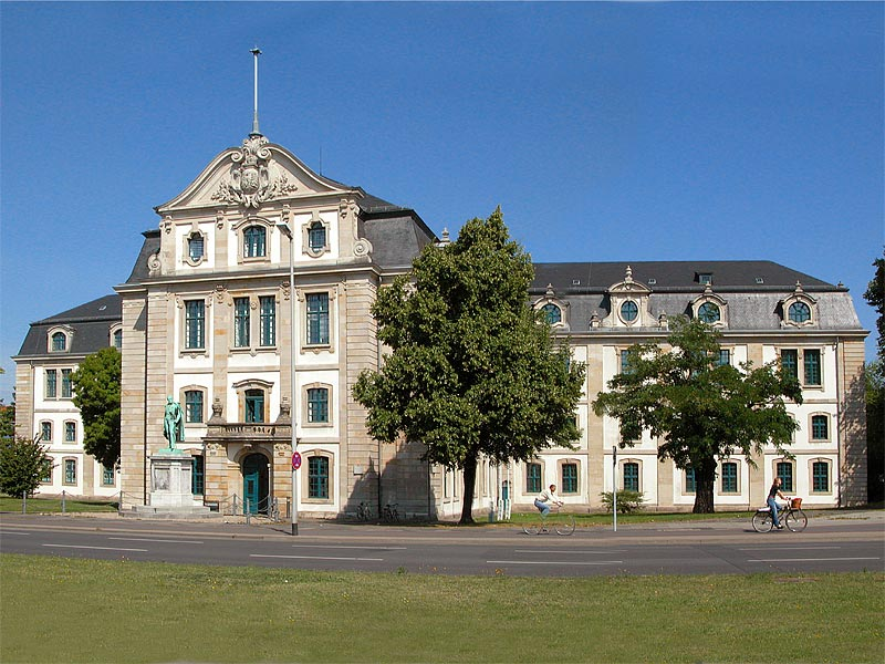 Niedersächsisches Landesarchiv